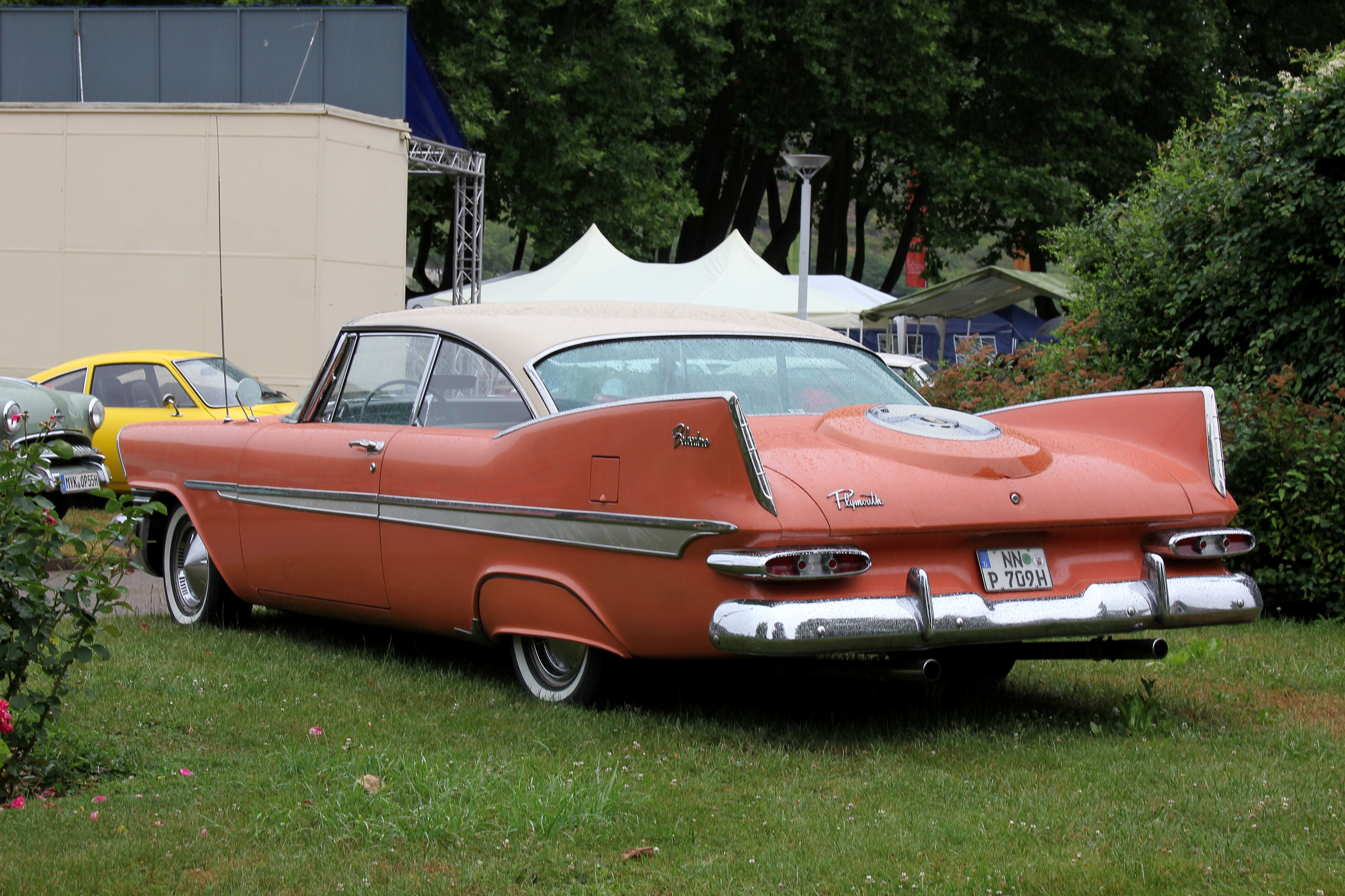 Plymouth Belvedere, Baujahr 1959, V8-Motor, 5950 cm³, Dreigangautomatik (Kennzeichen verändert)